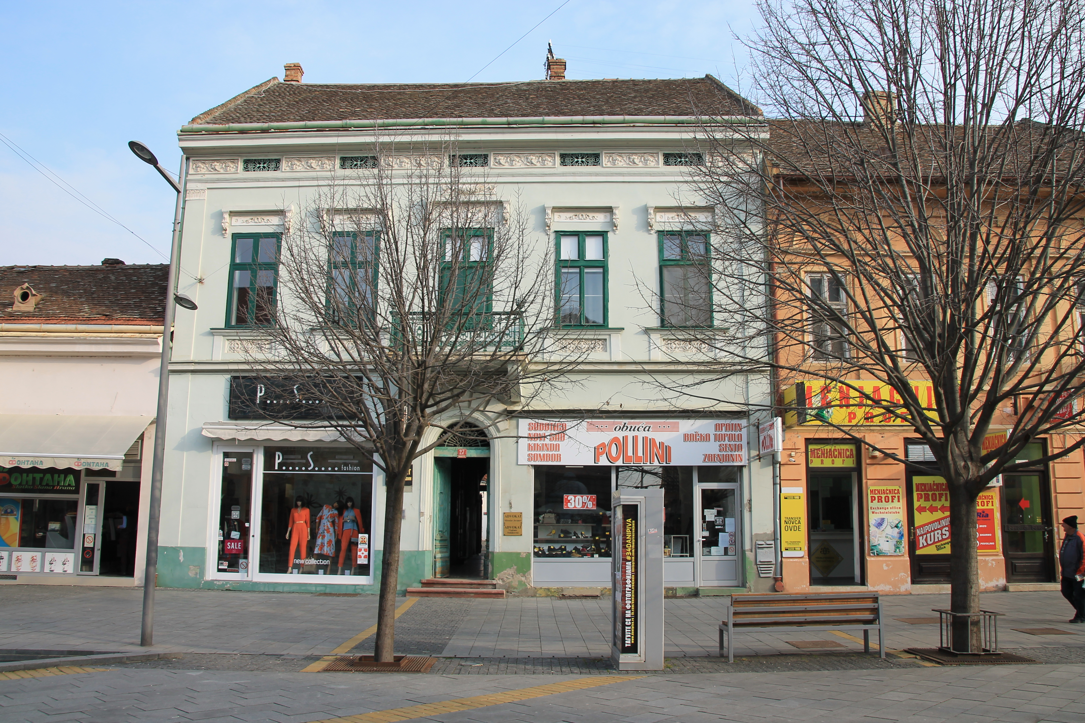 Staro jezgro Zrenjanina